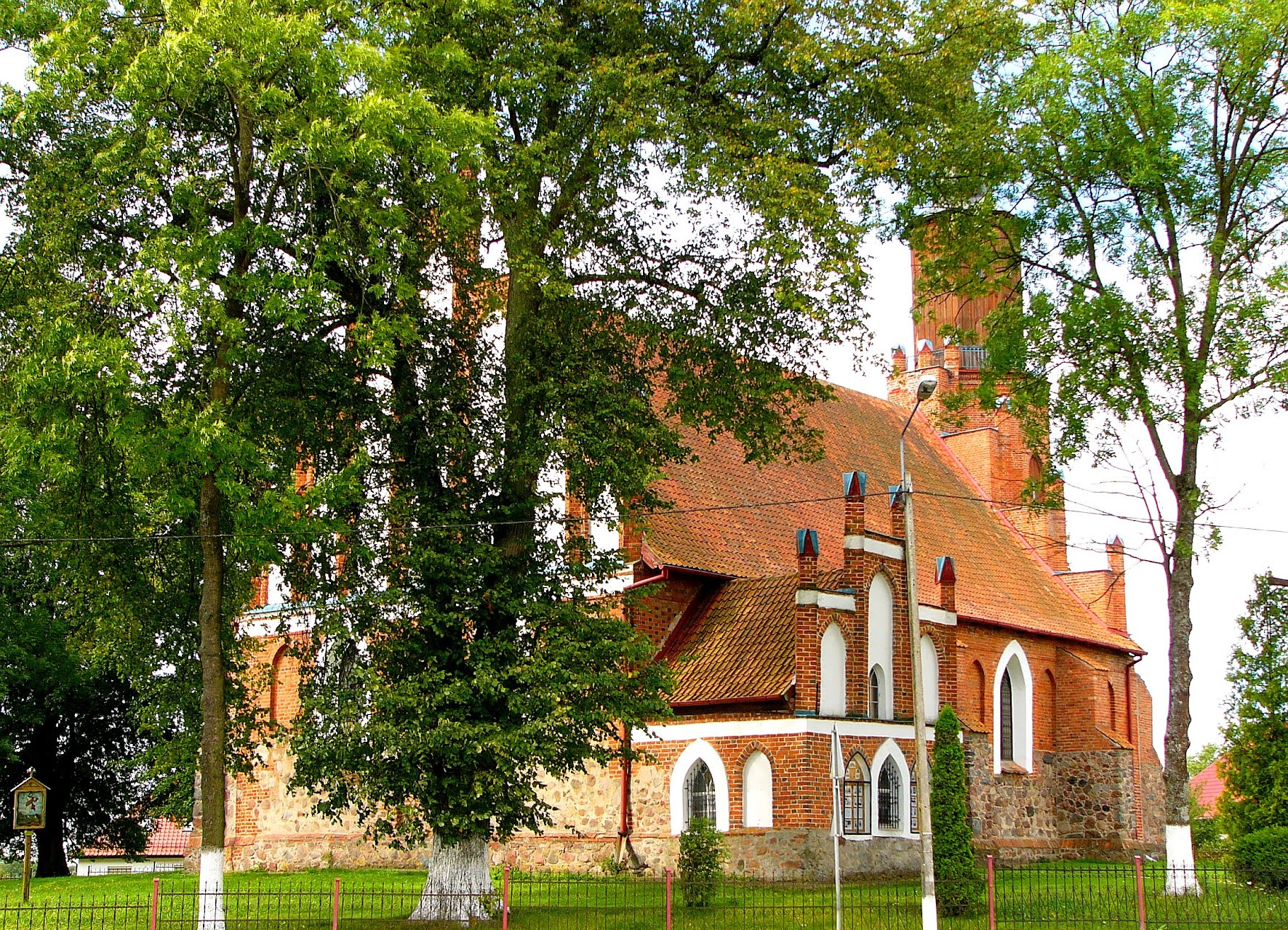 Winda - kościół pw. Matki Boskiej Nieustającej Pomocy wraz z rokokowym wyposażeniem wnętrza i otaczającym go cmentarzem (zabytek nr A-118)